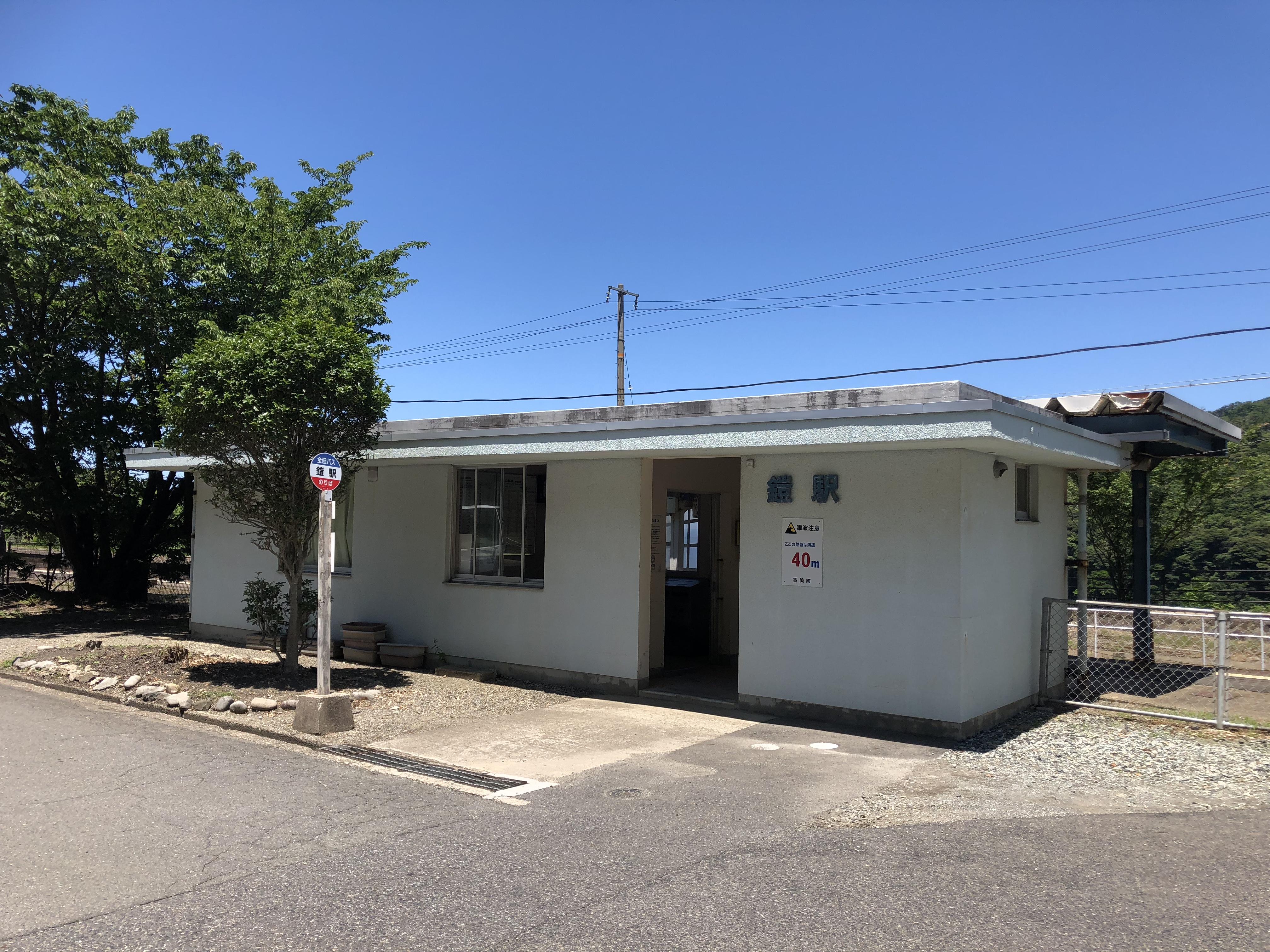 西日本旅客鉄道 鎧駅 駅舎